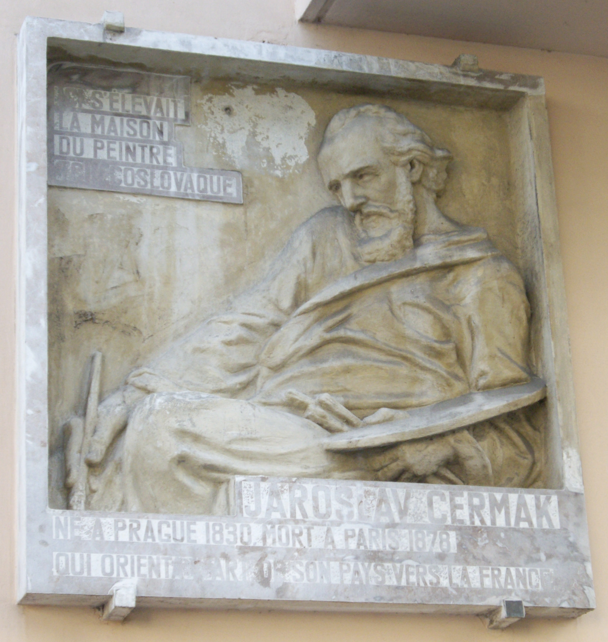 Plaque commémorative, 128 avenue de Wagram, Paris 17e. « Ici s'élevait la maison du peintre tchécoslovaque Jaroslav Čermák, né à Prague, 1830, mort à Paris, 1878, qui orienta l'art de son pays vers la France. »